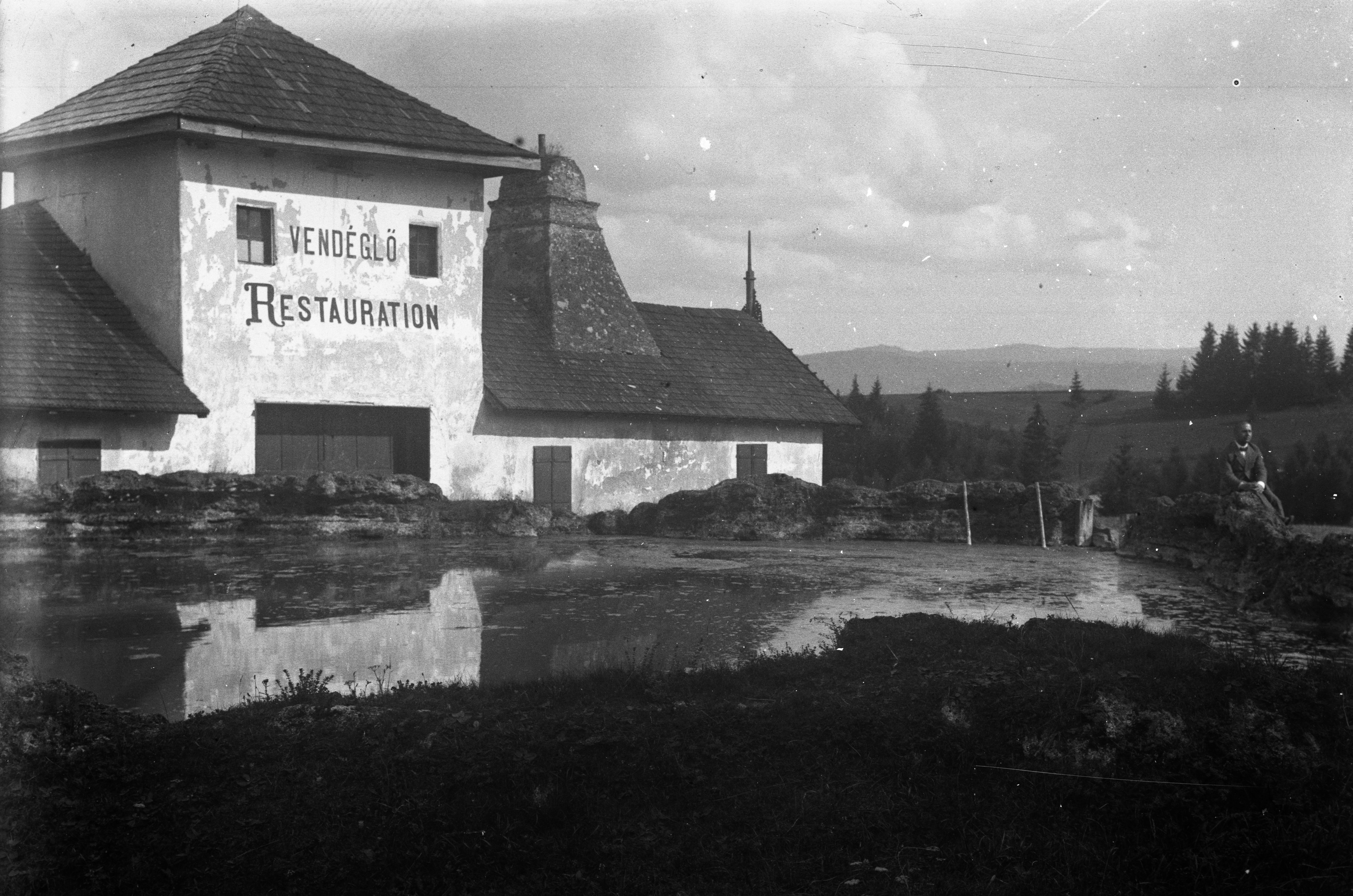 korábban Felső-Ruzsbach, ma Vyšné Ružbachy. Location: Slovakia, Vysné Ruzbachy Tags: restaurant, water Title: korábban Felső-Ruzsbach, ma Vyšné Ružbachy.